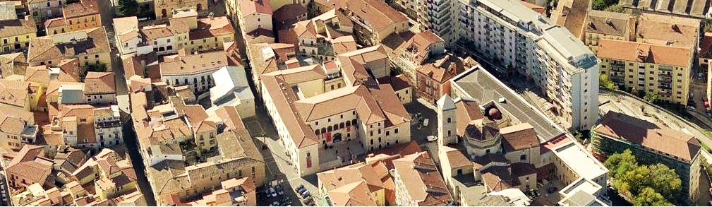 Vista dall'alto del Duomo sulla destra e del Museo Nazionale sulla sinistra (Palazzo Loffredo) di Largo Pignatari.